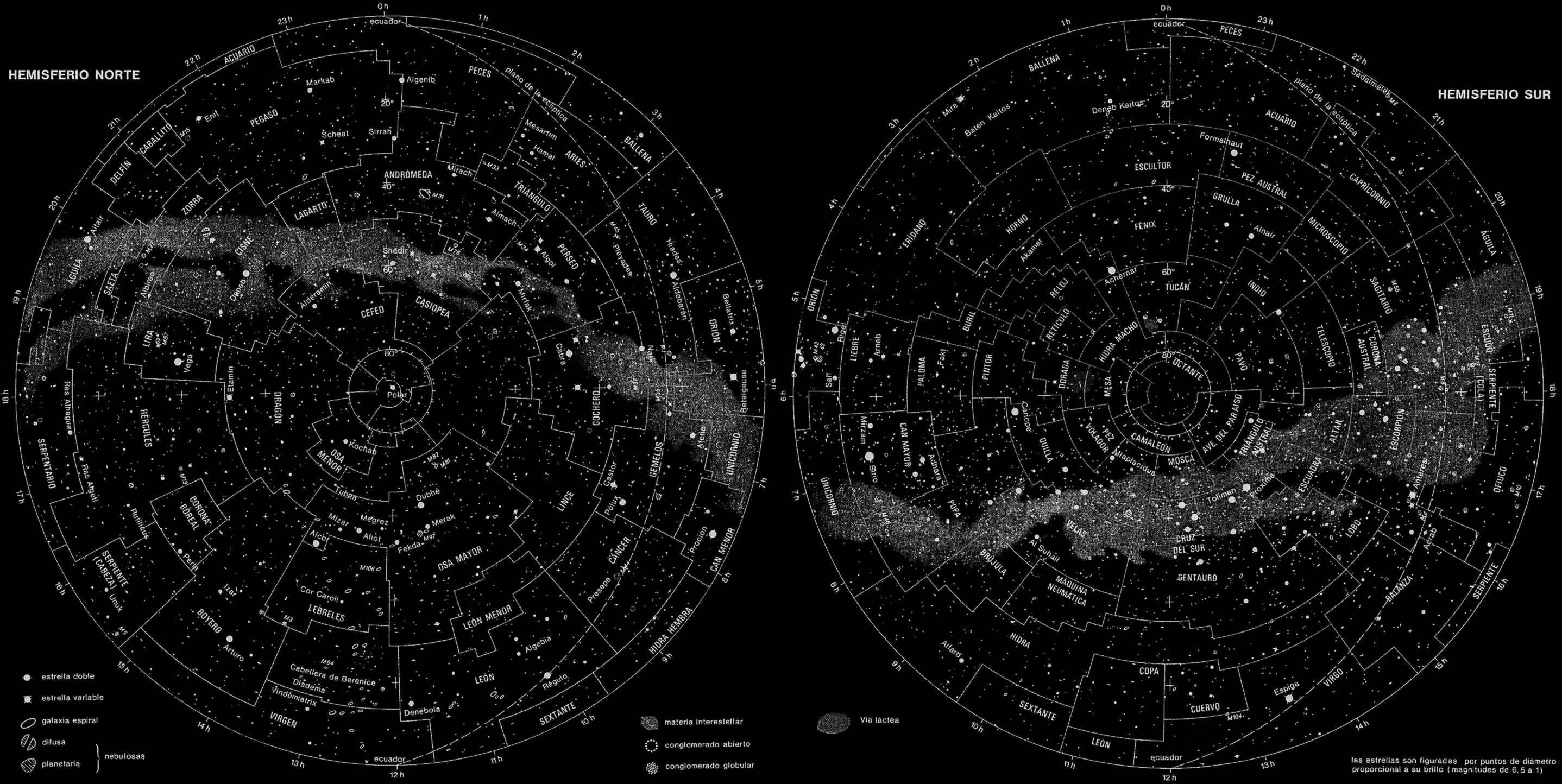 Carta celeste con las áreas de las contelaciones